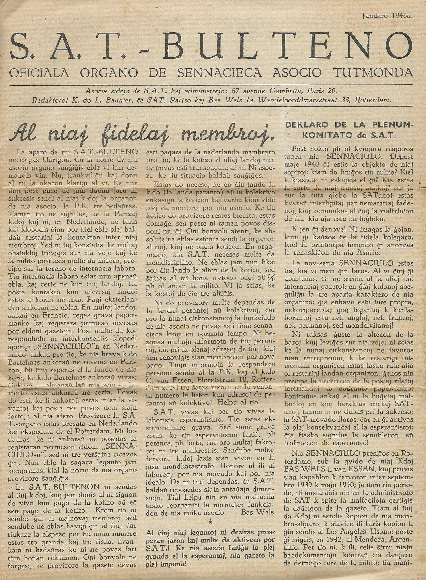 Antaŭpaĝo de "S.A.T. Bulteno"